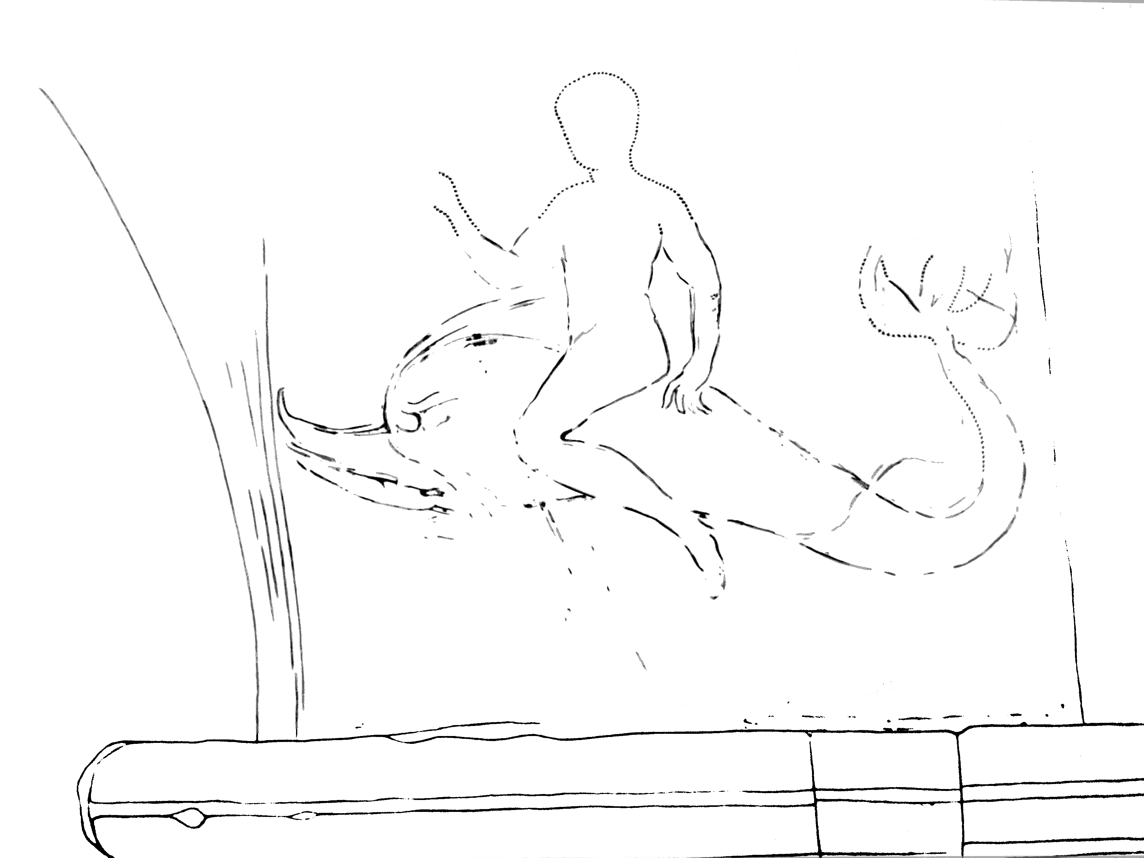 Eine Zeichnung der Wandmalerei im Gewölbe des Westwerks der Abteikirche von Corvey bei Höxter